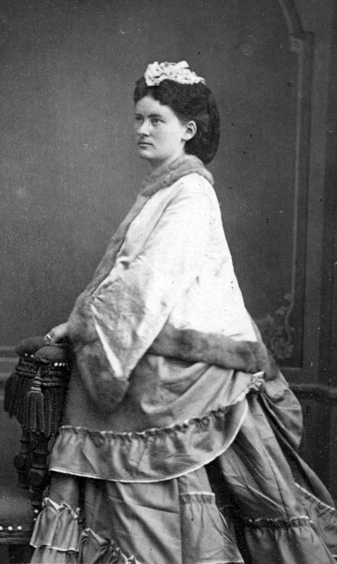 Photo portrait.